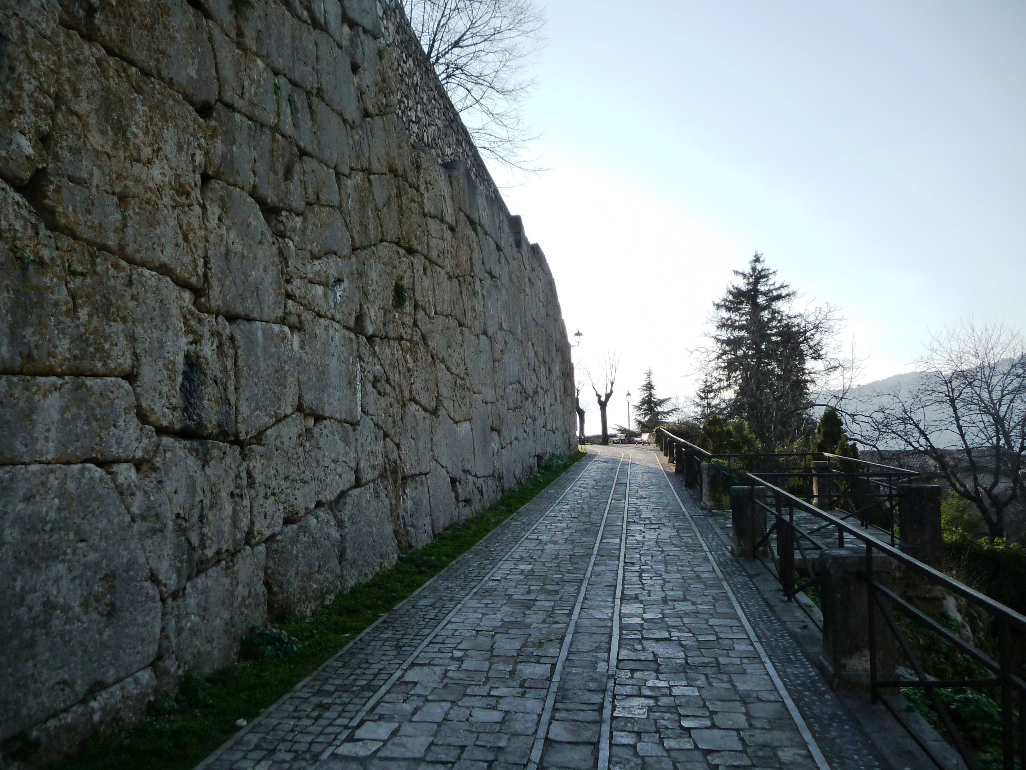 Lungo le mura